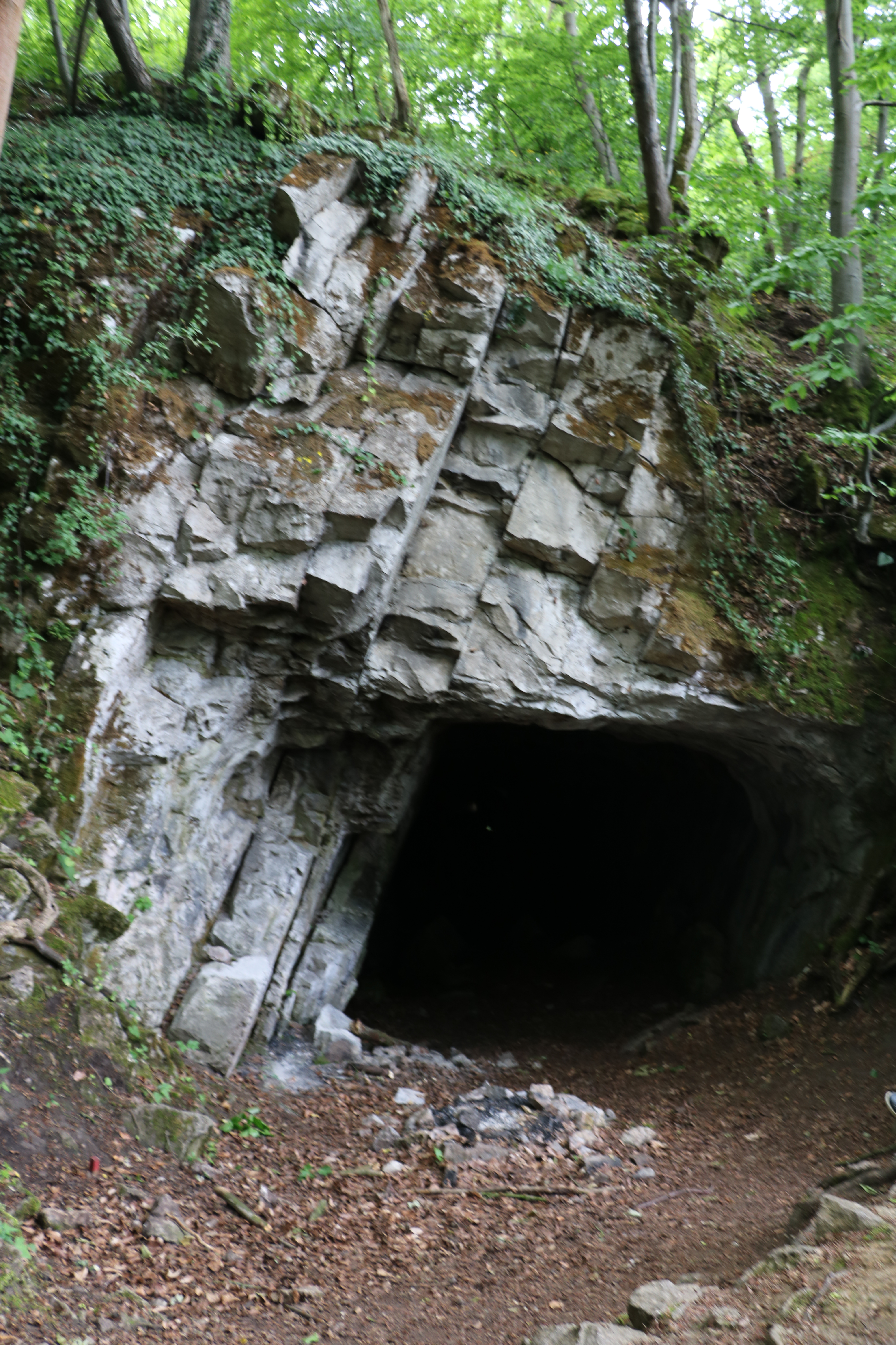 Kodská jeskyěně